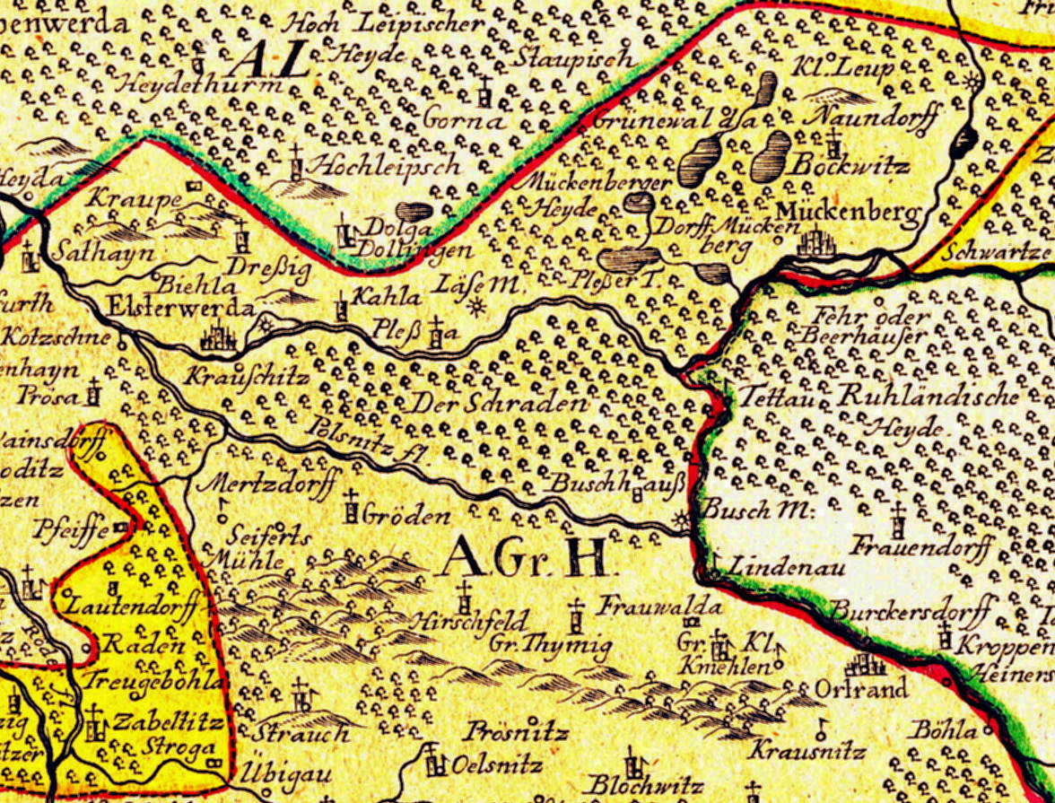 Ämter Grossen-Hayn und Zabeltitz